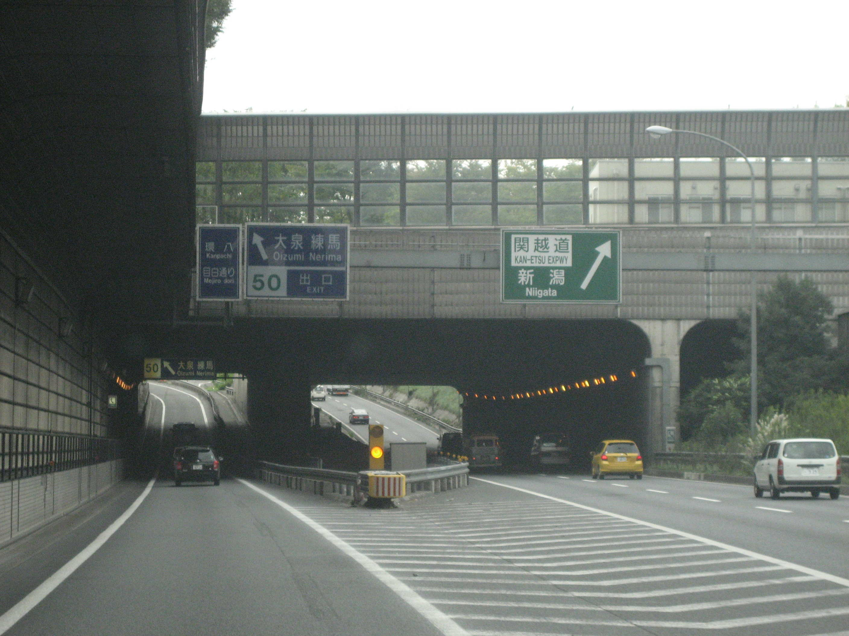 外環道大泉インター